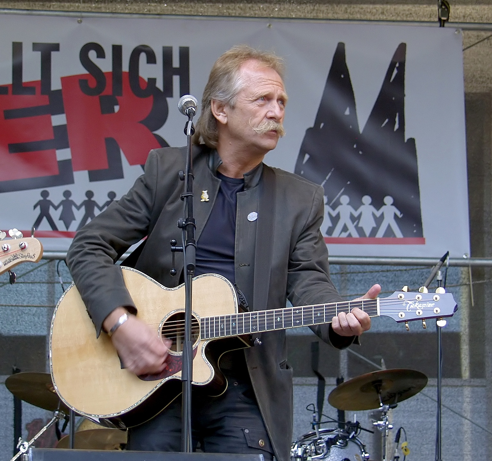 Henning Krautmacher der Gruppe „Höhner“ auf der politischen Demonstration „Köln stellt sich quer“ gegen den so genannten „Anti-Islamisierungskongress“ der rechtsgerichteten Partei „Pro Köln“ vor dem Gürzenich in Köln.